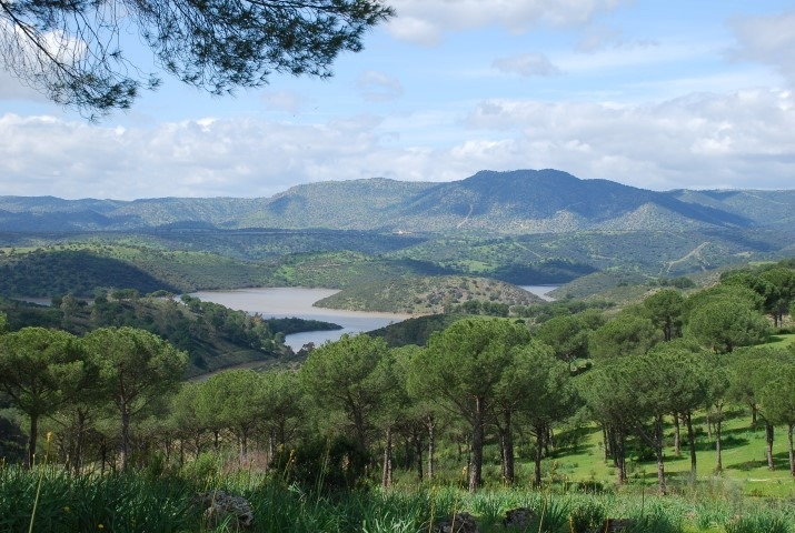 Vista general de la sierra y del pantano en el entorno de Baños